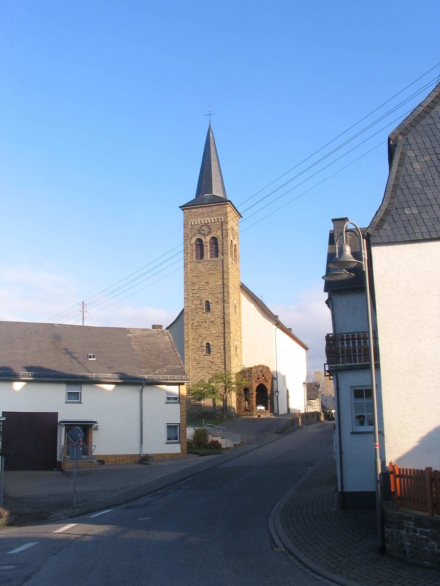 Kirche Bickenbach im Hunsrück